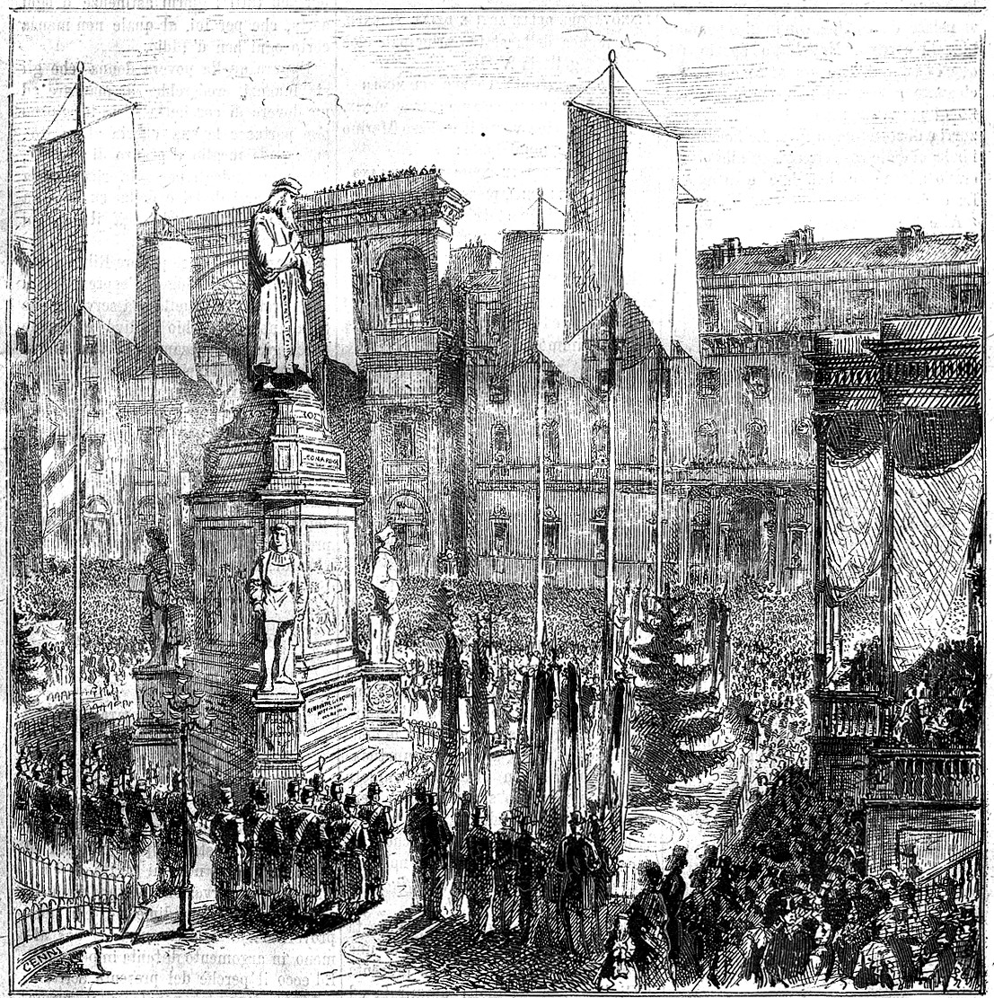 Inaugurazione del monumento a Leonardo da Vinci